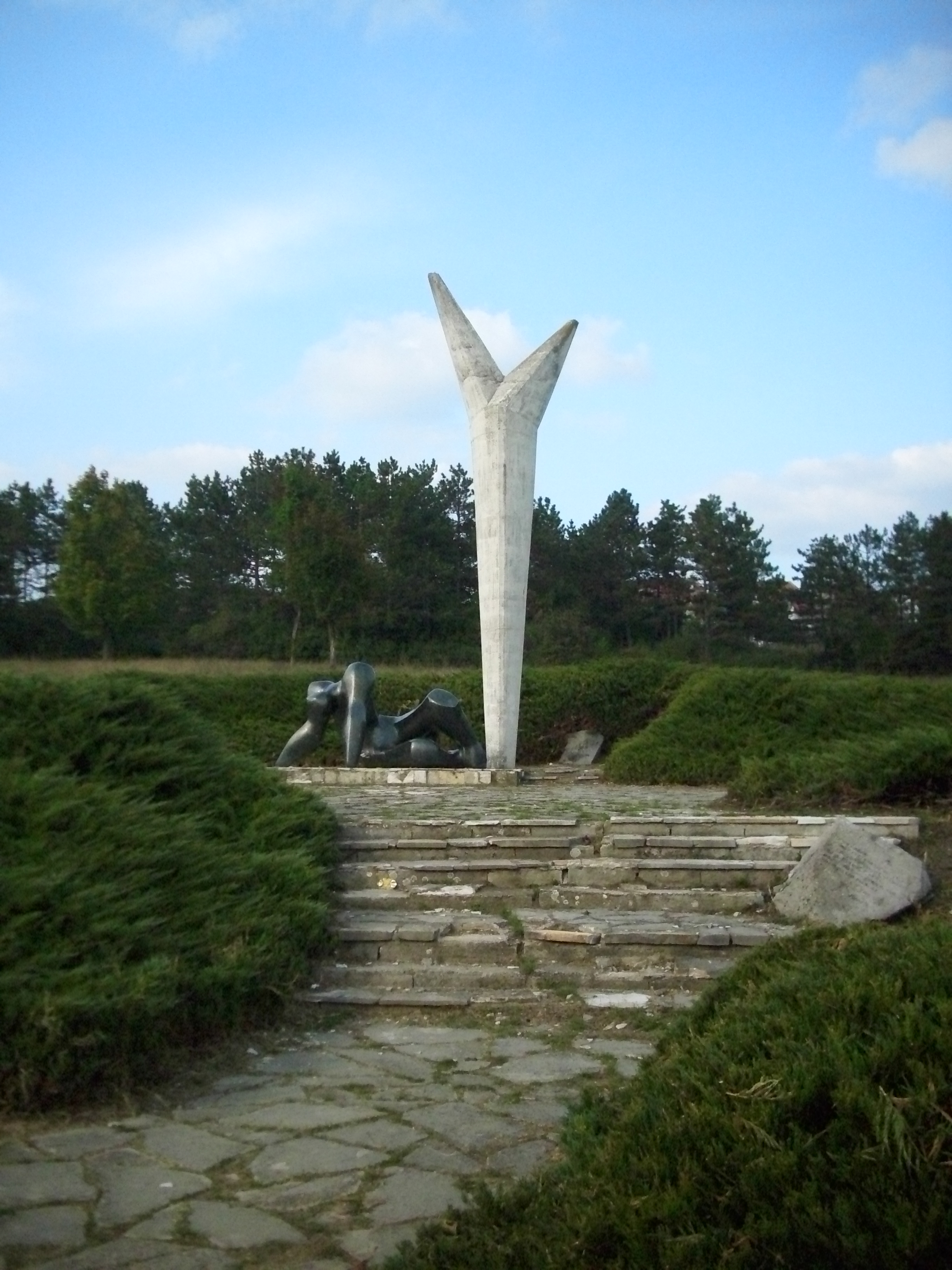 Споменик отпора и слободе, изграђен 1966. Аутор: Анте Гржетић. Представља велику бронзану фигуру смртно рањеног човека, који се последњим напорима снаге грчевито бори за још који тренутак живота, али ту битку губи. Ипак, изнад њега се уздиже бели обелиск, на врху раздвојен у слово V, симбол победе и тријумф живота над смрћу.